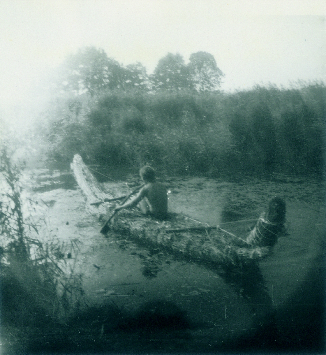 Exprimentalboot von Dominique Görlitz.